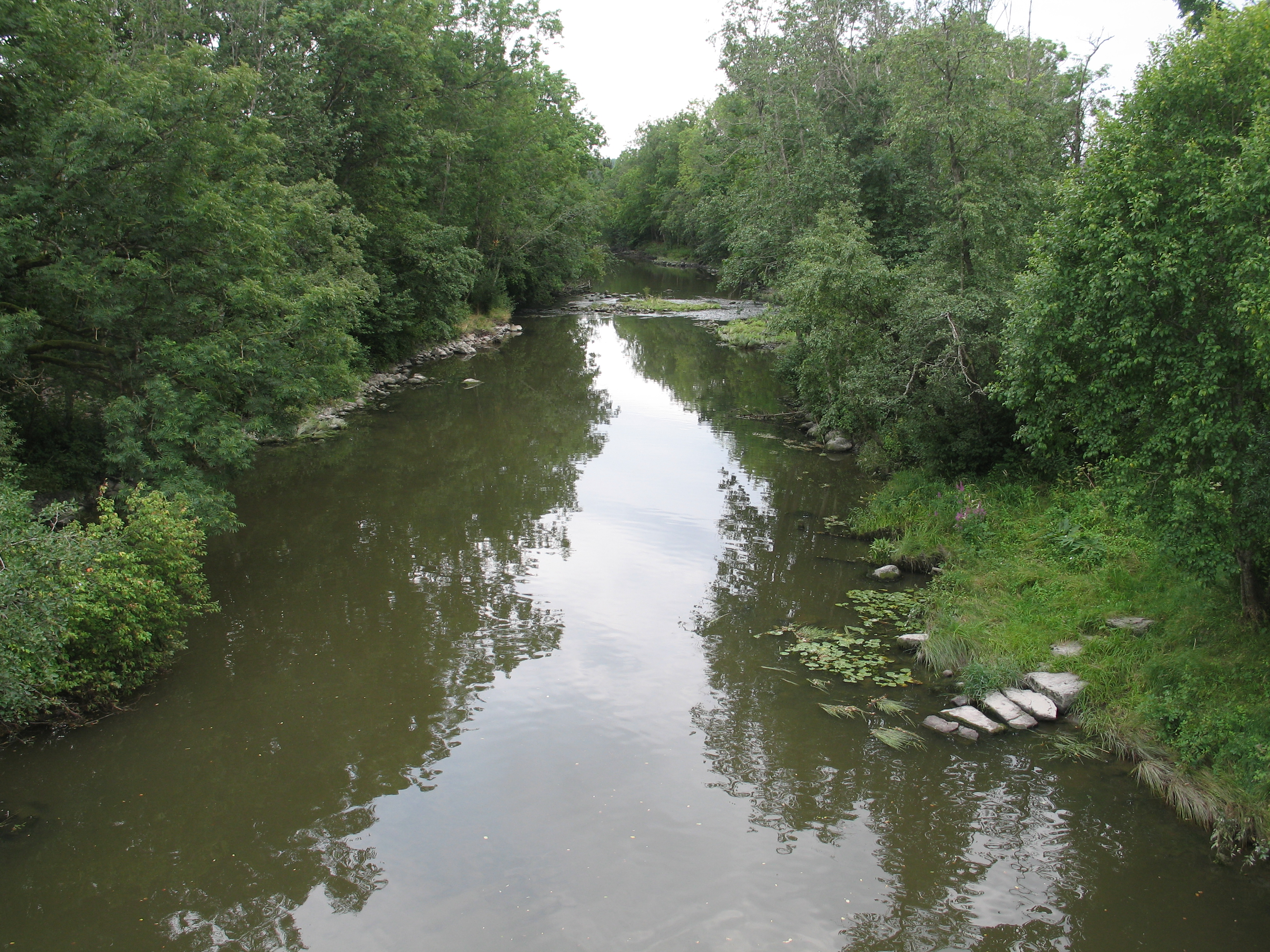 The River Aulielva throught the Raet, Sem in Vestfold, Norway.